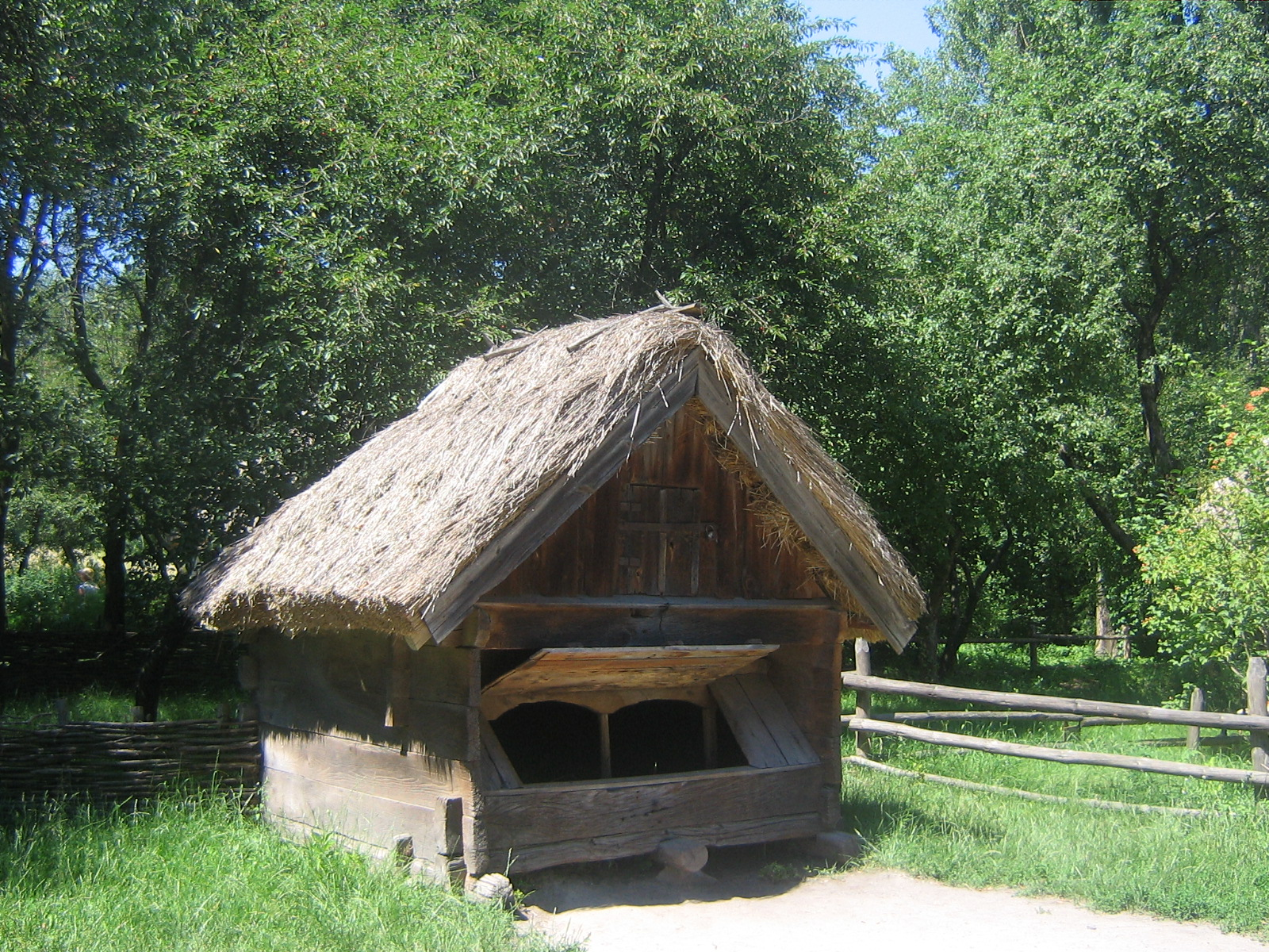 Національний музей народної архітектури і побуту України (с. Пирогів), Київ, Червонопрапорна вул., с. Пирогів